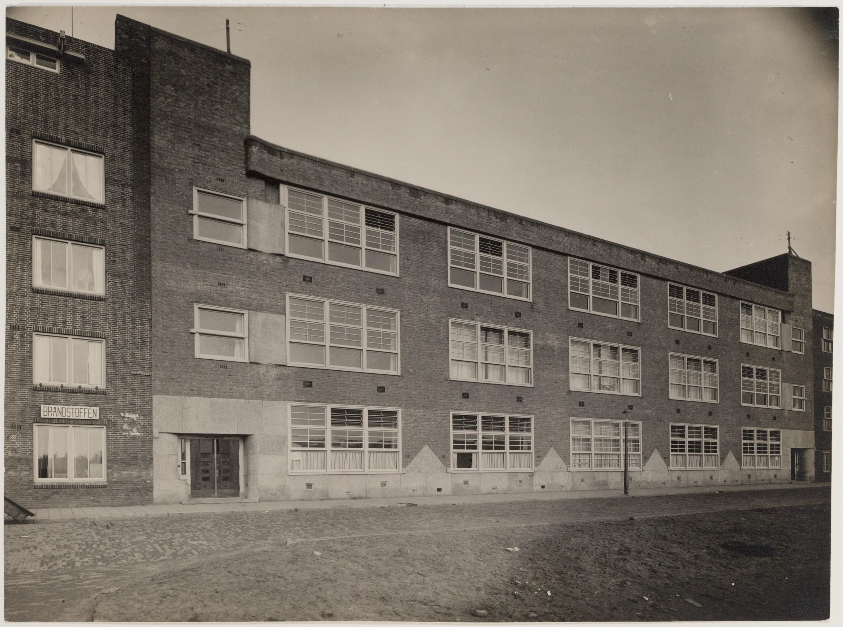 Beschrijving Balboastraat 18-22 (ged.) (v.r.n.l.) met de Magalhaensschool, dubbele school voor gewoon lager onderwijs nummer 20 Op nummer 22 brandstoffenhandel van C.W.Th. Becht. Documenttype foto Vervaardiger Onbekend Anoniem Collectie Collectie Stadsarchief Amsterdam: foto-afdrukken Datering 1926 ca. Geografische naam Balboastraat Inventarissen Afbeeldingsbestand OSIM00004001938